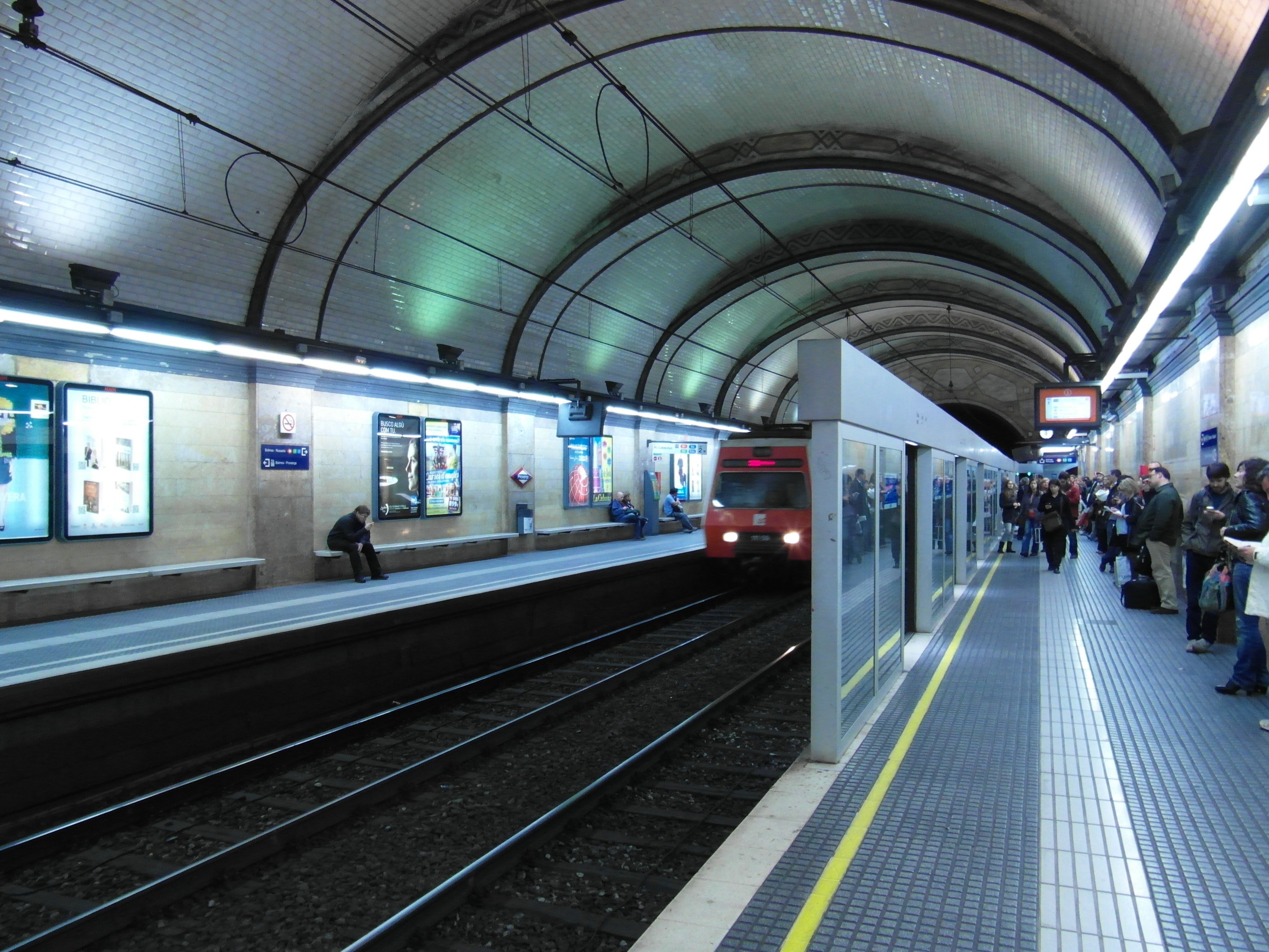 Barcelona - Estació de Diagonal-Provença